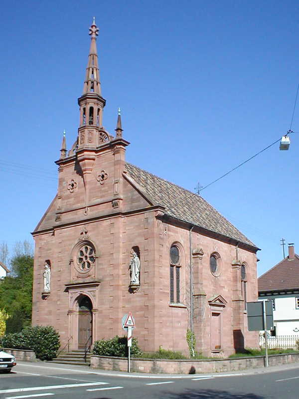 Marienkapelle in Waibstadt, erbaut 1910